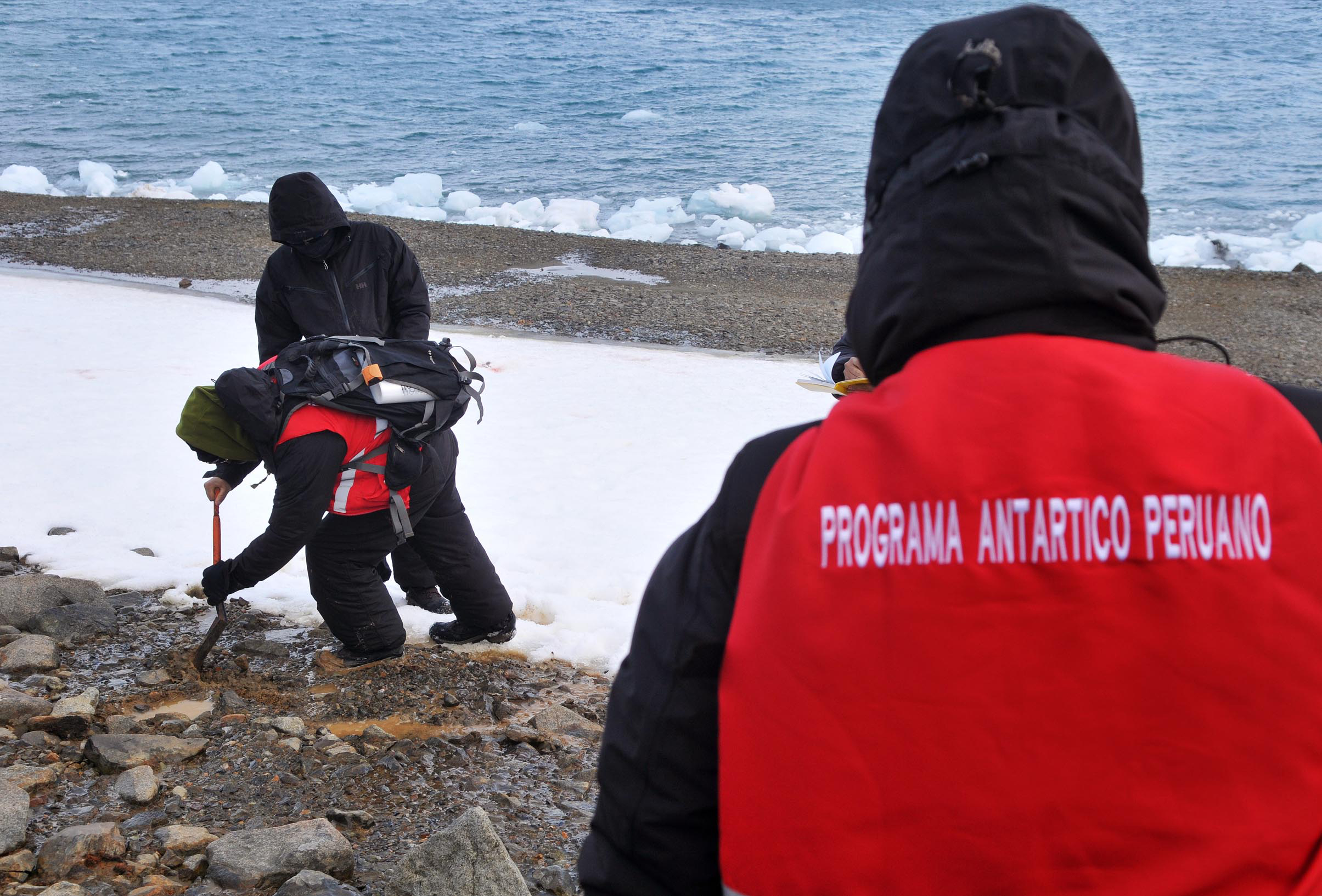 La Estación Científica Antártica “Machu Picchu”- ECAMP recibió a los expedicionarios peruanos para el inicio de los labores de la campaña ANTAR XXIII que se viene realizando desde el 19 de enero y continuará hasta el 18 de febrero. Los 43 exploradores pertenecientes a diferentes instituciones públicas y privadas involucradas con las actividades de investigación científica, académica, de gestión ambiental y de apoyo logístico que lidera el Ministerio de Relaciones Exteriores, trabajan con el objetivo de profundizar el aporte científico del Perú al conocimiento de la Antártida; actualizar los estudios técnicos de base para la formulación de proyectos orientados al fortalecimiento de la infraestructura antártica nacional; fortalecer la cooperación con otros Estados Parte del Tratado Antártico; y, contribuir a la difusión del valor de la Antártida como Reserva Natural para la Paz y la Ciencia. Asimismo, los científicos del Instituto Geológico Minero y Metalúrgico (INGEMMET), realizan estudios para mejorar la infraestructura que tiene el Perú en la Antártida a fin de encontrar nuevas fuentes de agua que serán usadas en nuestra estación científica.